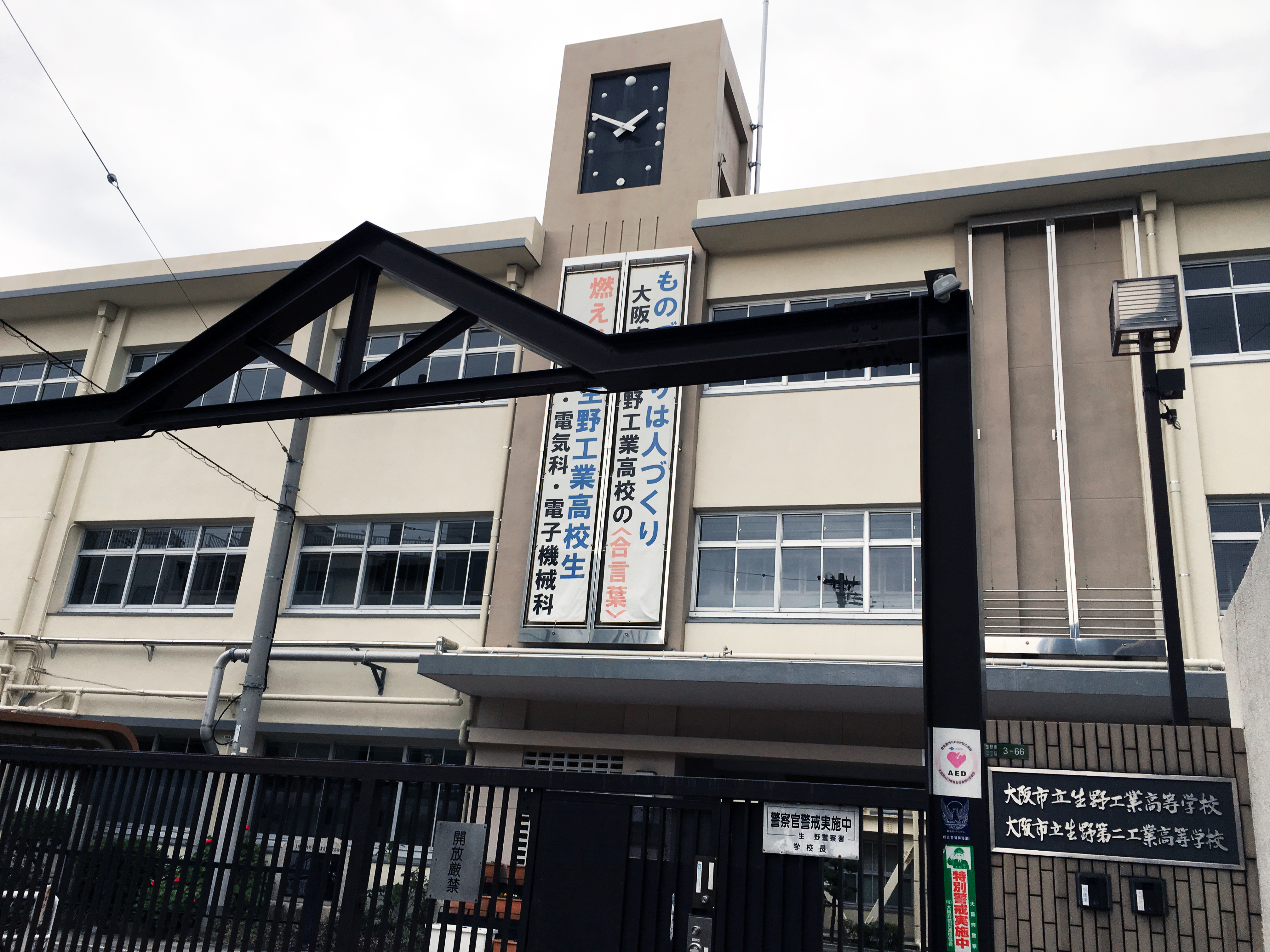 生野工業高校・生野第二工業高校